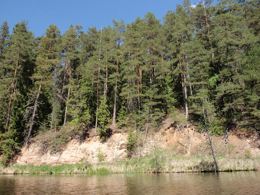 Haavaniidu pae, 2015 mai